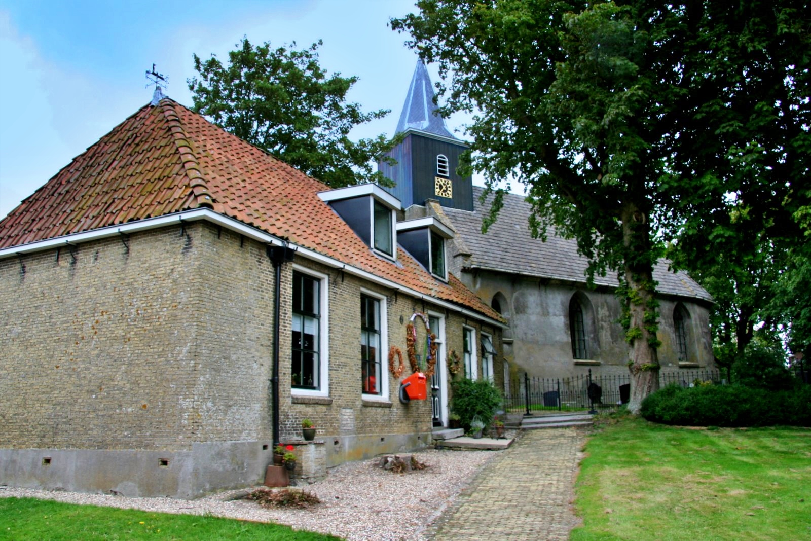 Het kenmerkende kerkje van Huins uit de 13e eeuw. Huins bezit een beschermd dorpsgezicht.